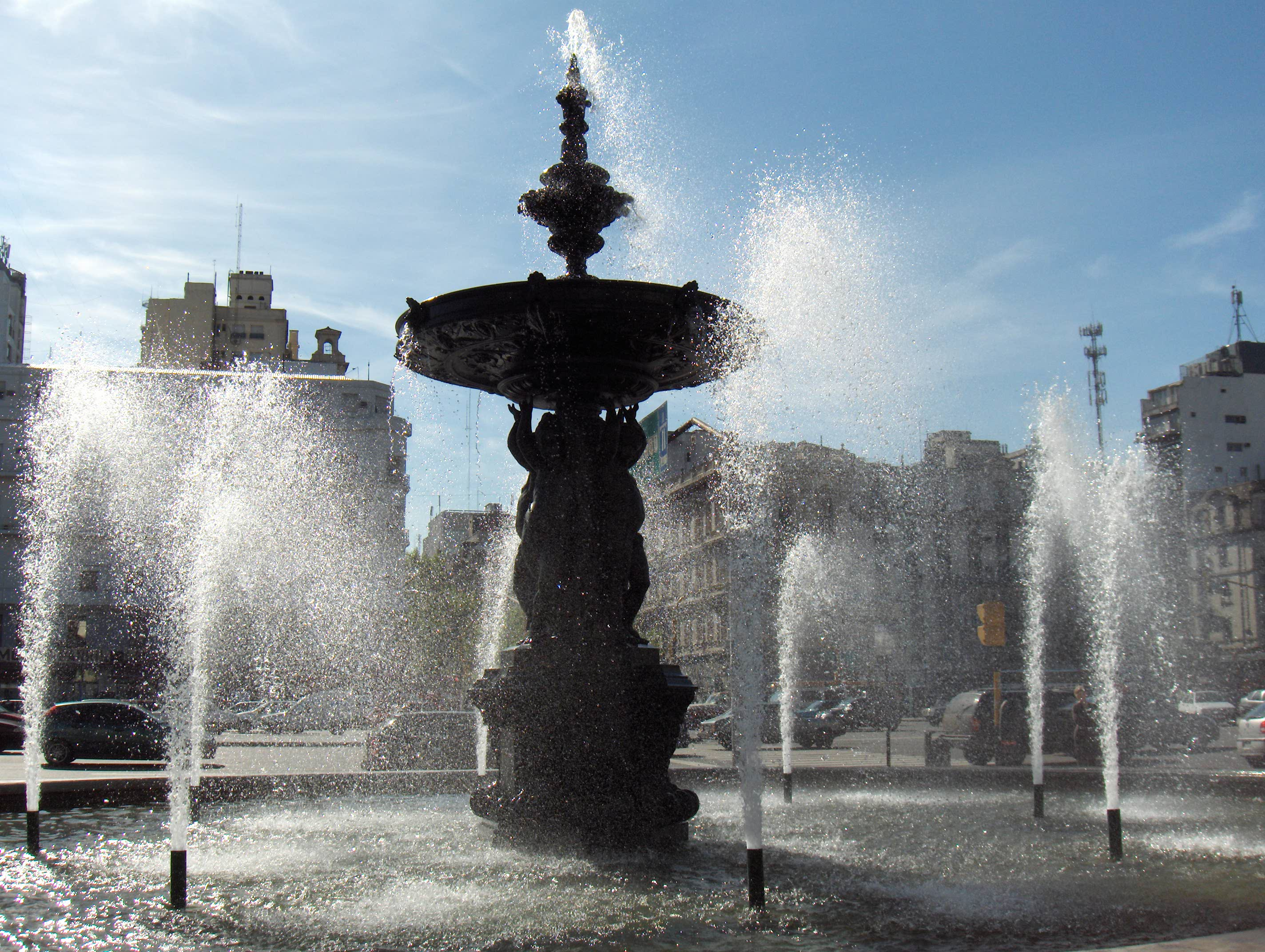 Fuente ubicada en la intersección de Avenida de Mayo y 9 de julio, Buenos Aires, Argentina.